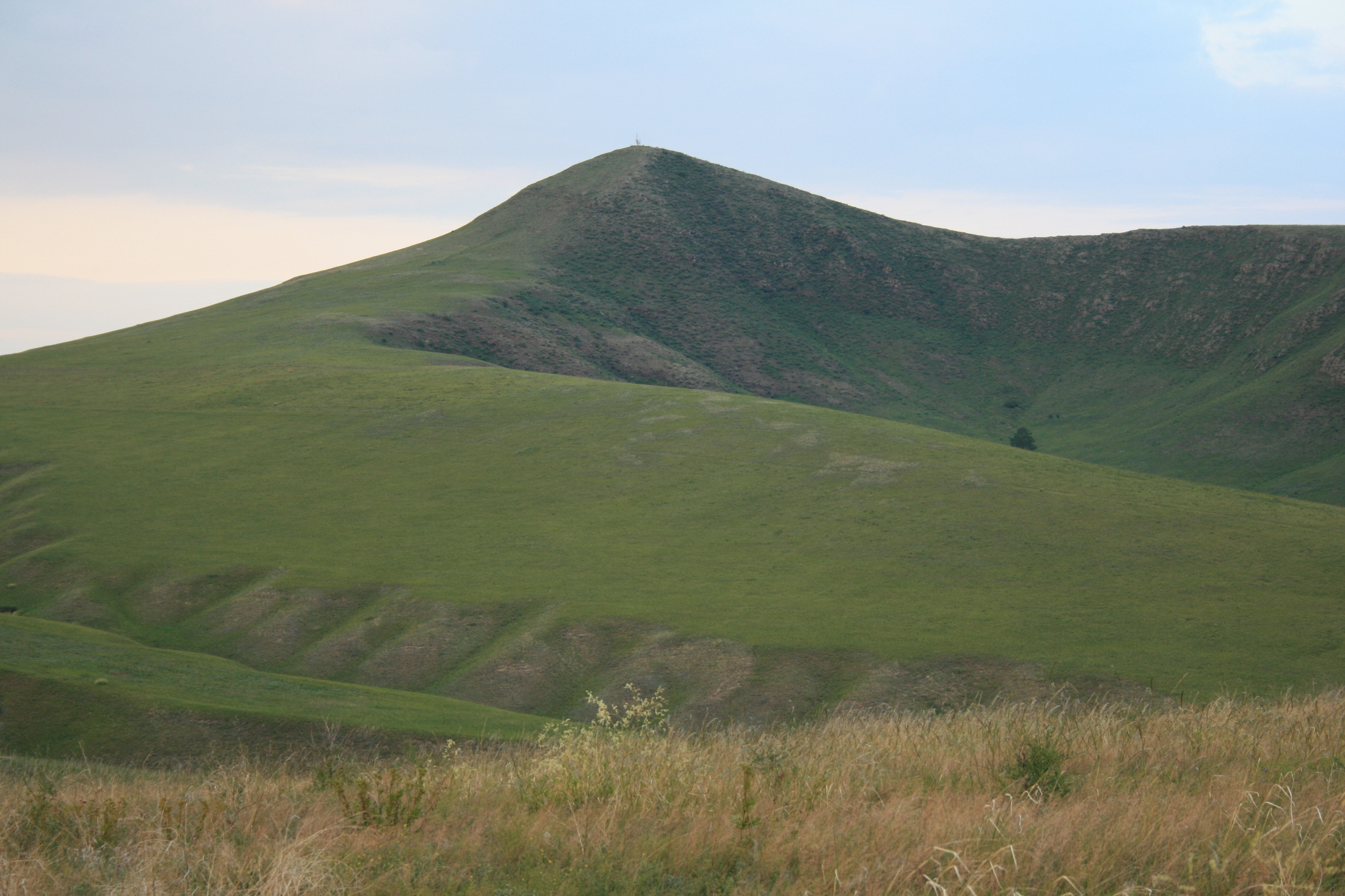 Гора Хараты, юго-западный склон, где раскинулась реликтовая роща сибирского абрикоса. Зарубино (Джидинский район)